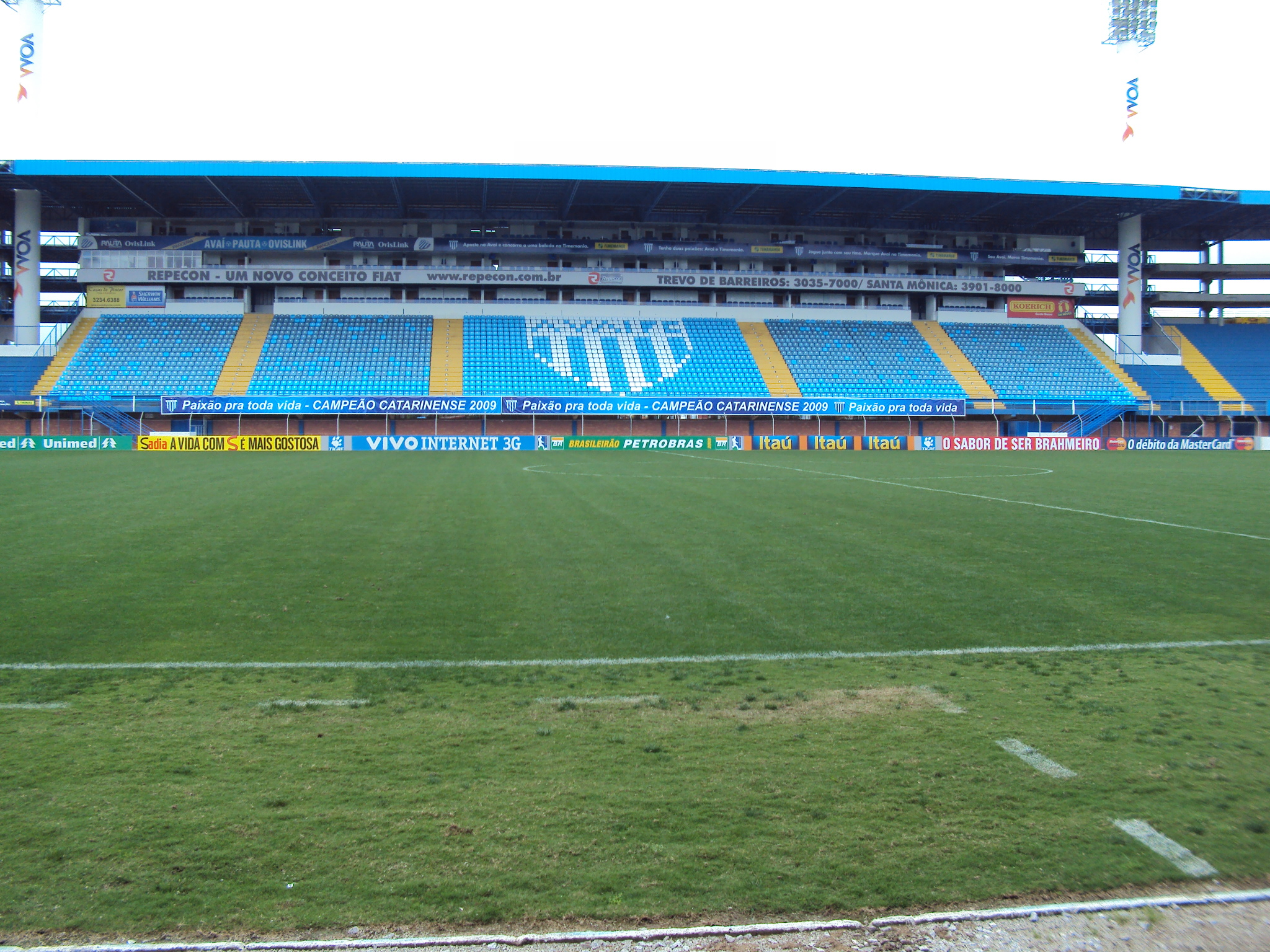 Estádio da Ressacada do Avaí Futebol Clube.